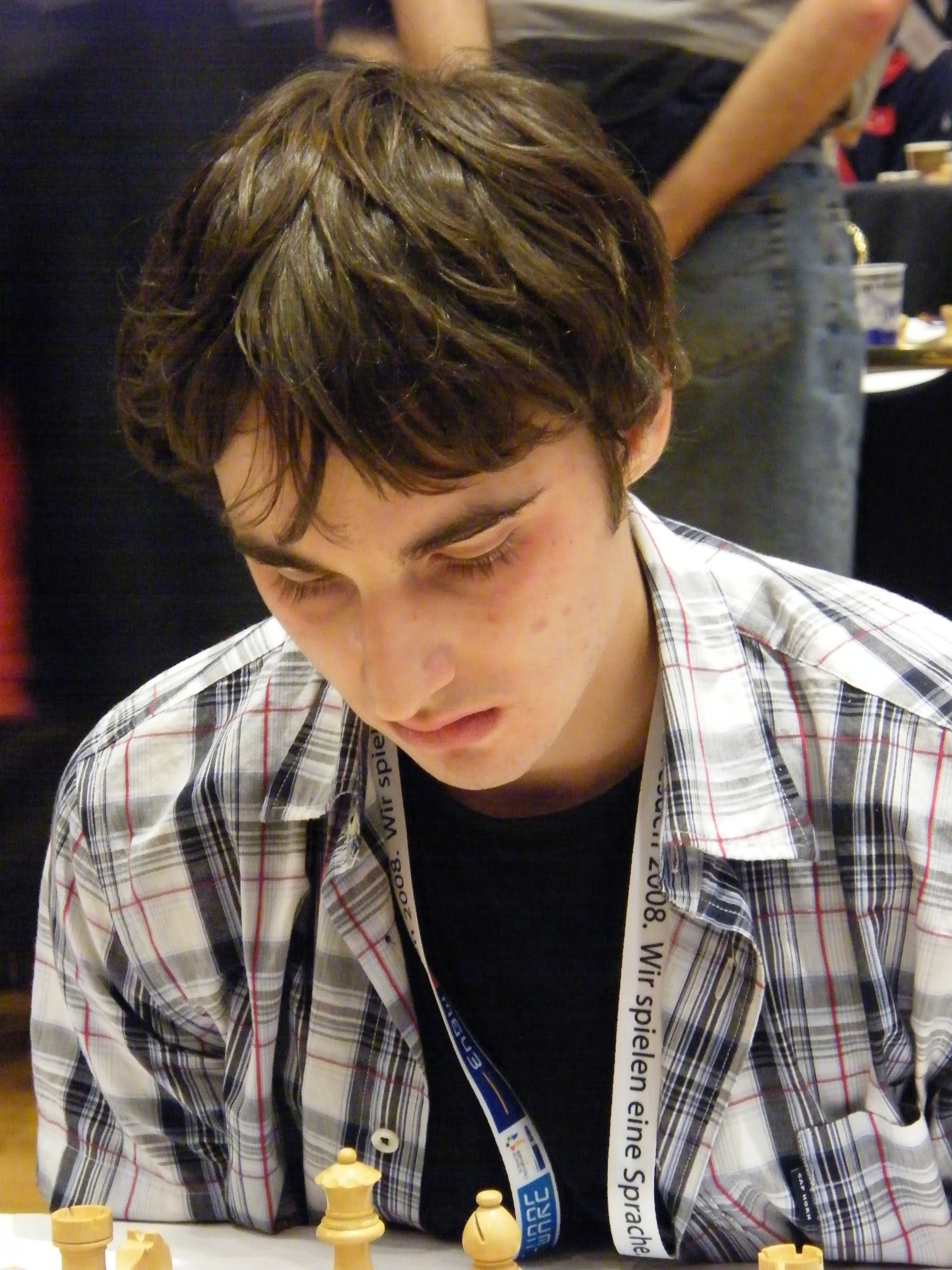 Vitalis Samolins bei der Schacholympiade 2008 in Dresden